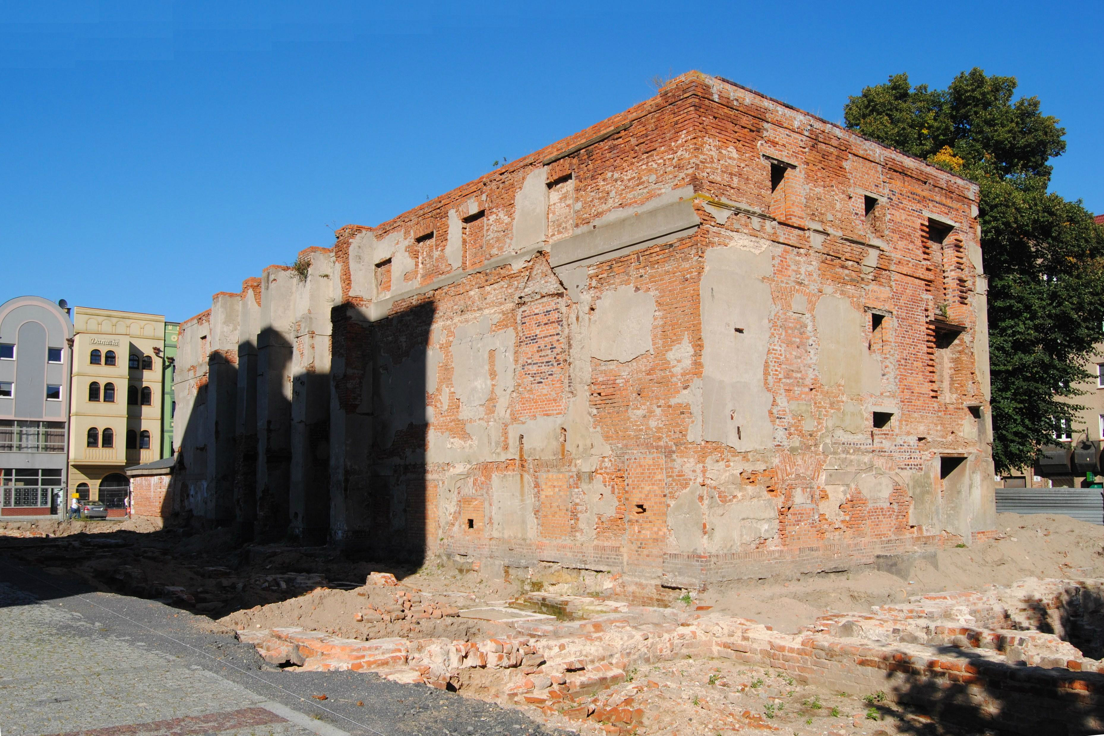 Głogów, teatr (ruina), 1799-1801